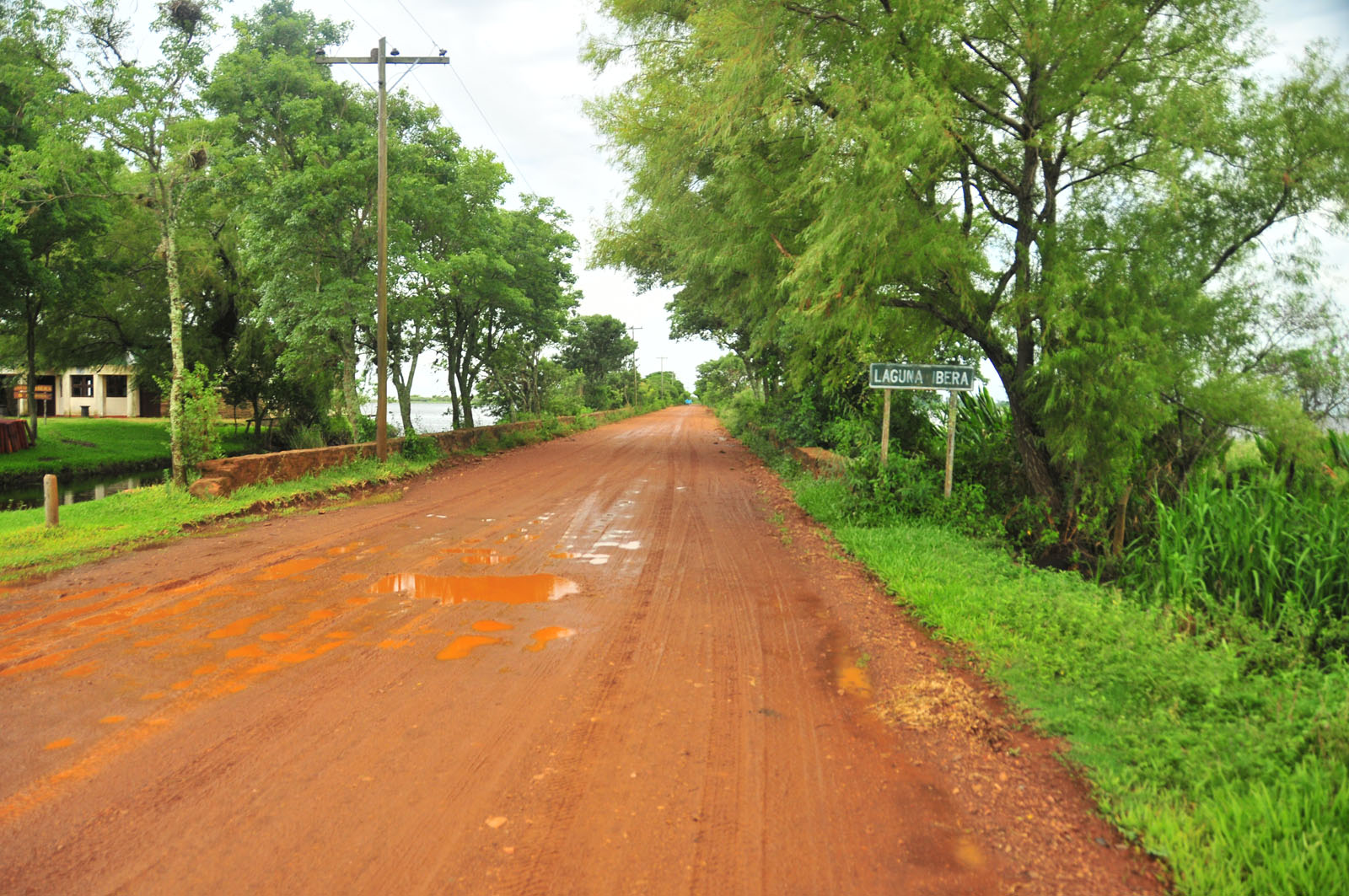 Rutas de acceso al Iberá. Fotos de los Esteros del Iberá en Argentina